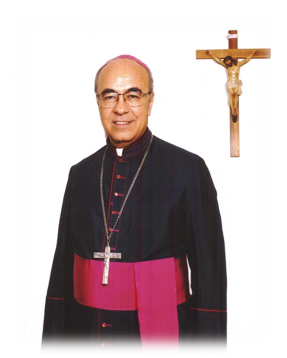 Foto do Bispo Diocesano de Santo Amaro, Dom Fernando Antônio Figueiredo